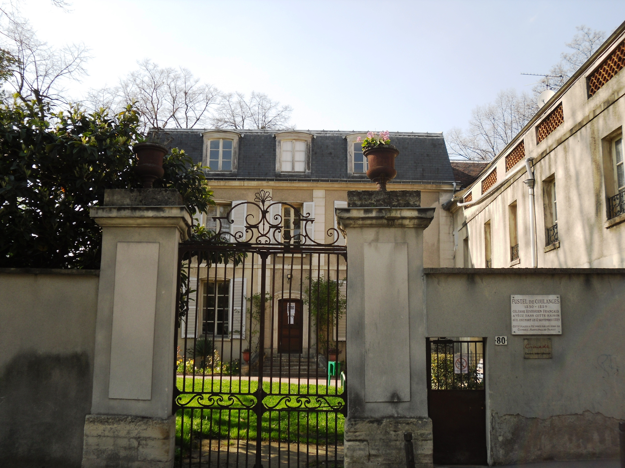 La maison de Fustel de Coulanges à Massy (91)